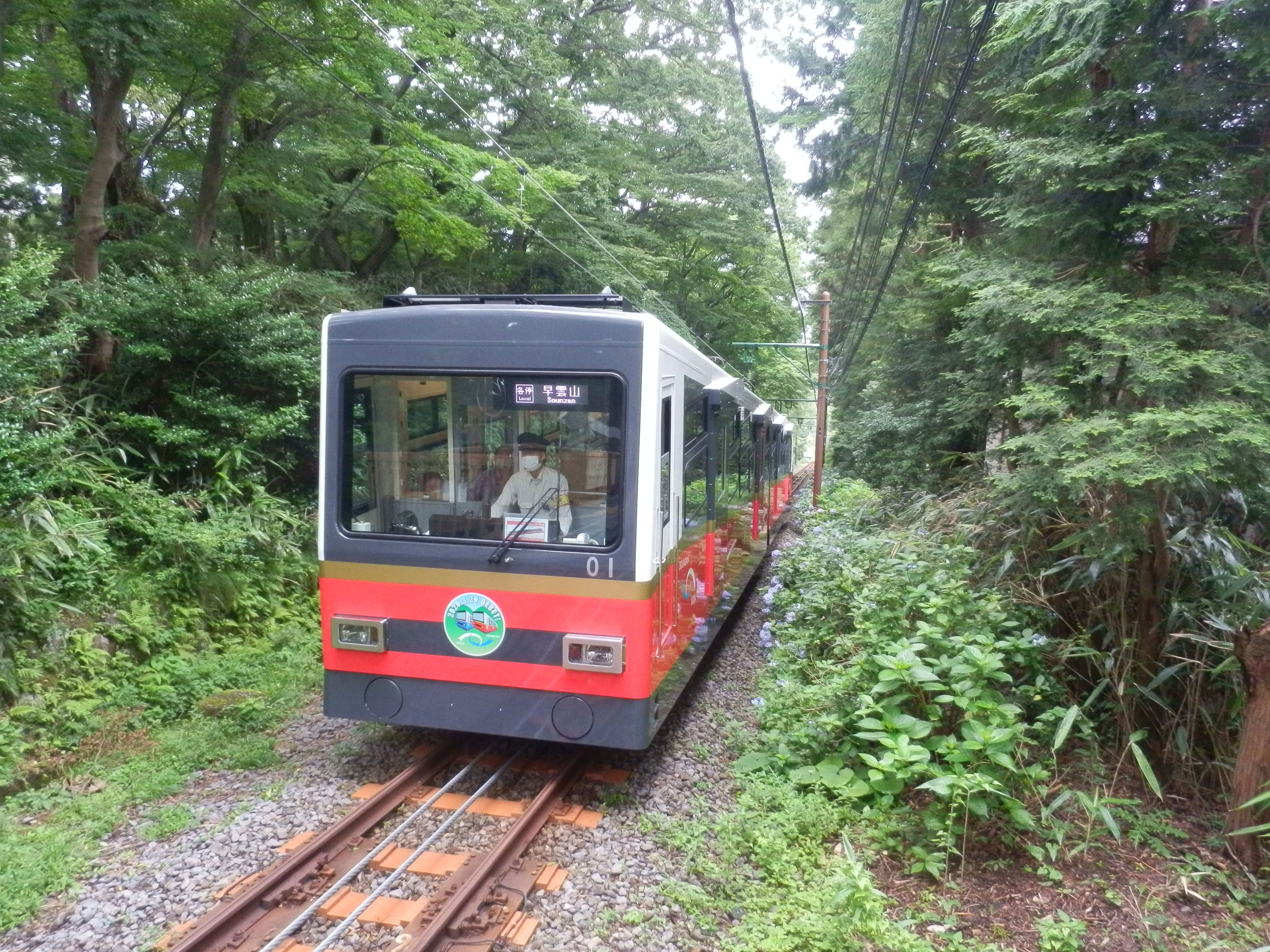 箱根登山ケーブルカー（上強羅駅にて撮影）